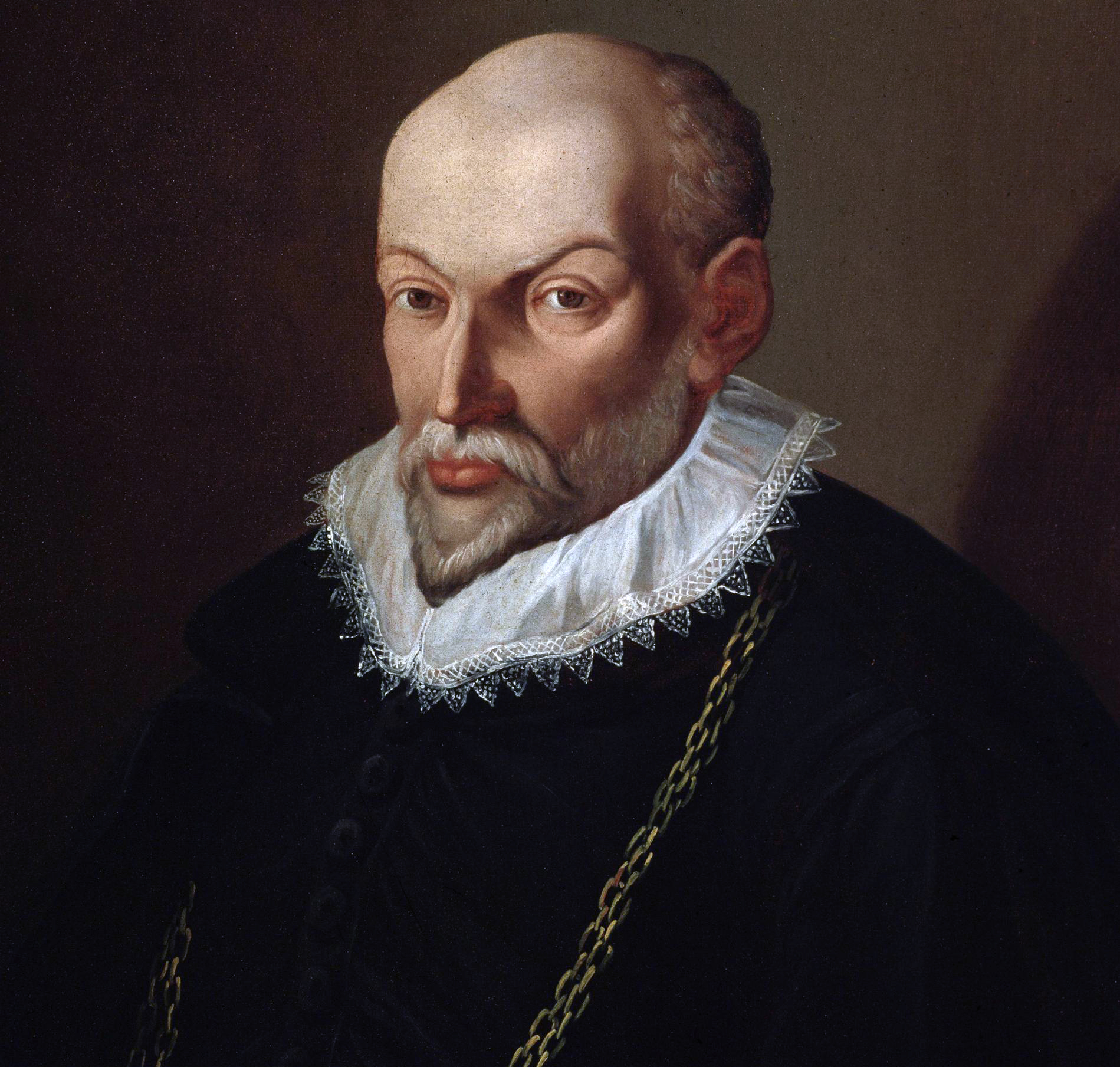 Orlande de Lassus (1535-1594), composer